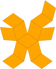 развертка ромбододекаэдра